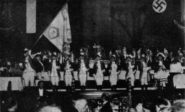 UK 1933 en Kolonjo. Kolonja Karnavala Korpuso dum la Rejnlanda Vespero